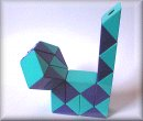 RubiksSnake_Cat.jpg